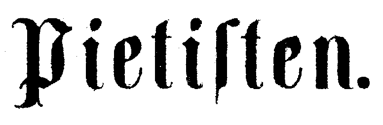 Tidskriften Pietistens titel.